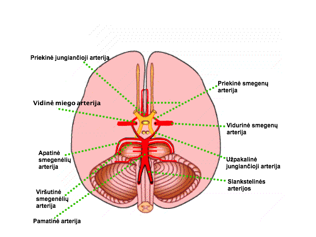 Dažniausios galvos smegenų aneurizmų vietos